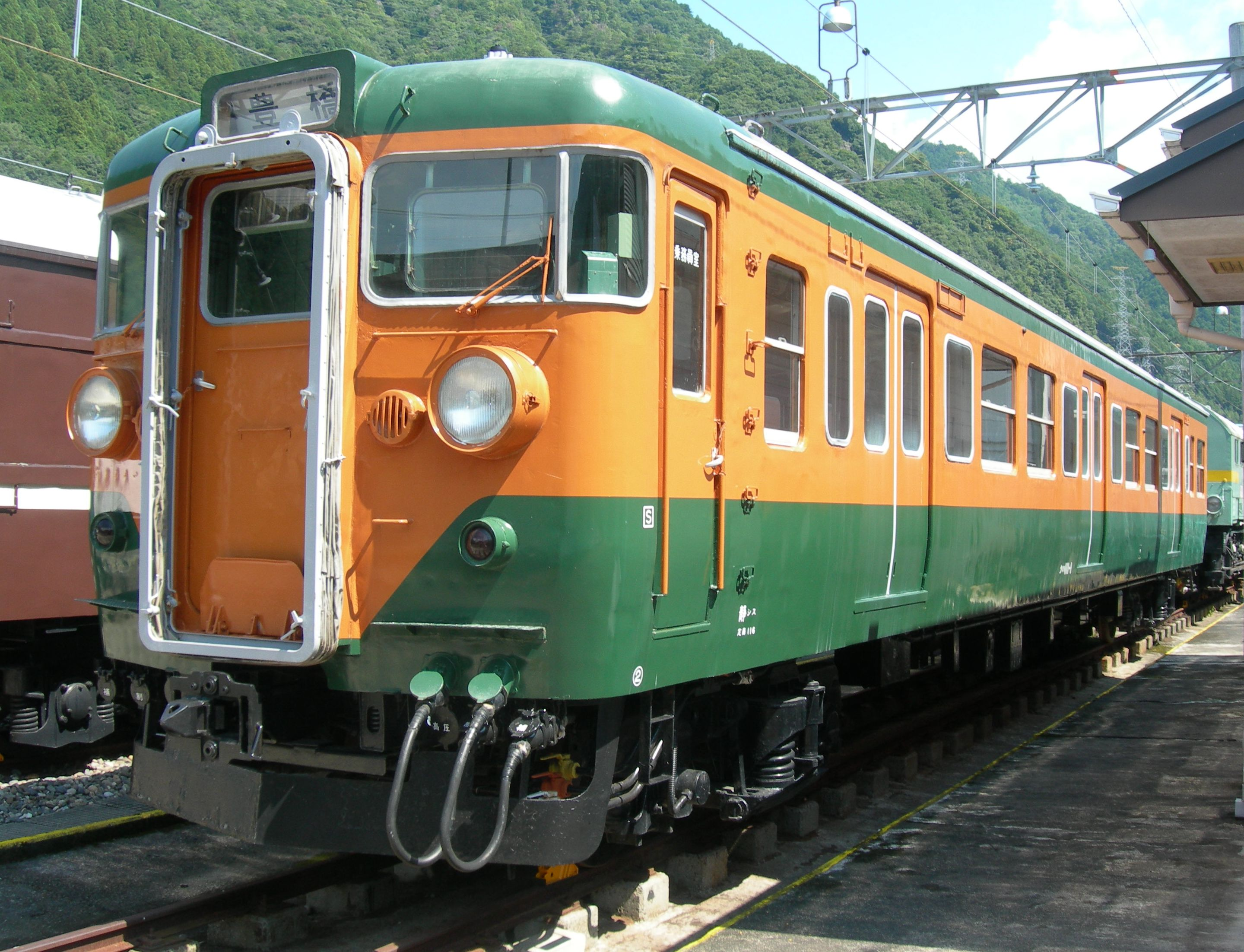 国鉄111系クハ111-1